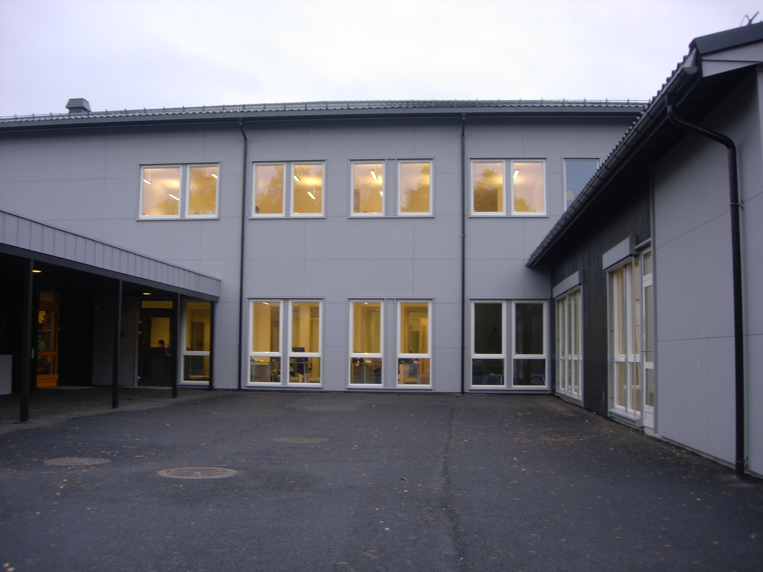 Hovedinngangen på nordsiden av skolebygningen.